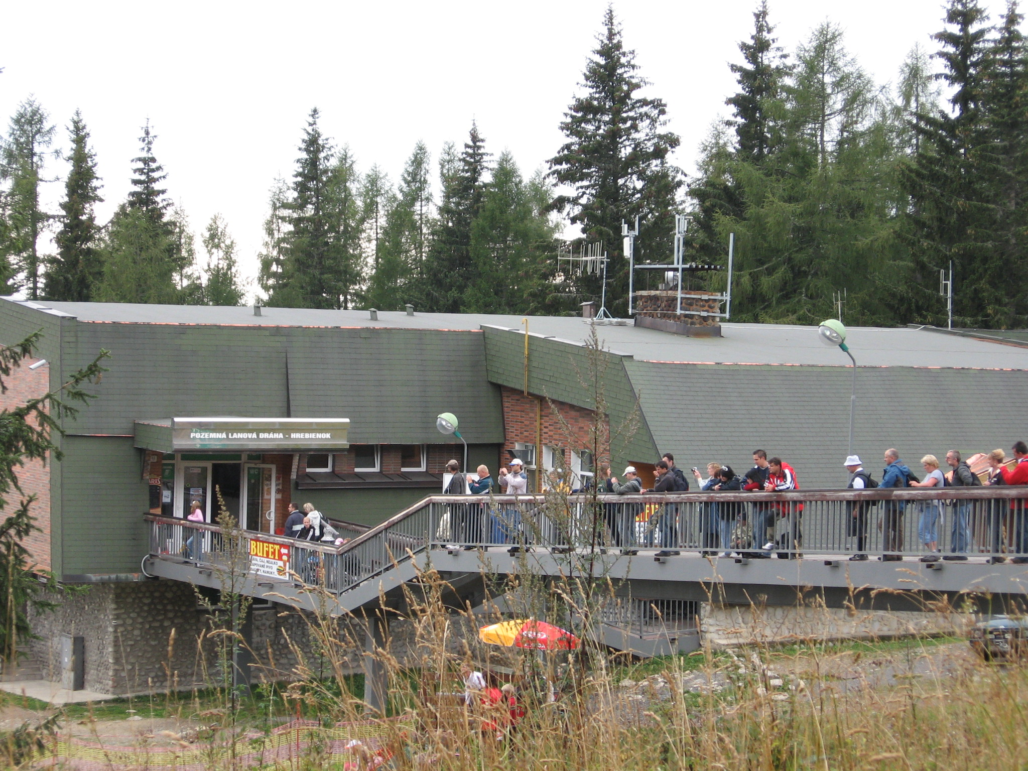 Vrcholová stanica pozemnej lanovej dráhy zo Starého Smokovca na Hrebienok